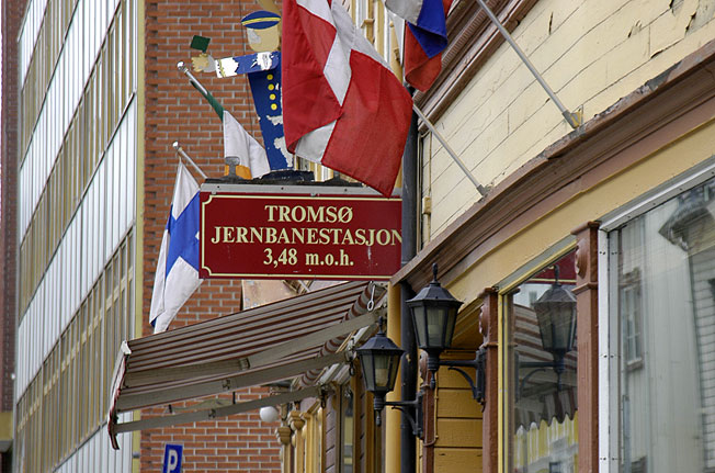 Utested i Tromsø. Kulsted da det faktisk ikke finnes noen jernbane som binder denne opp mot landets øvrige jernbanestasjoner. Popular på grunn av innredning og opprop om fasteavganger til Murmansk og Kautokeino.